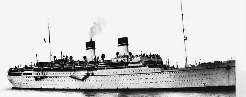 Il transatlantico Roma con lo scafo dipinto di bianco nel periodo in cui venne impiegato per le crociere in Mediterraneo in una foto della Società Italia di Navigazione